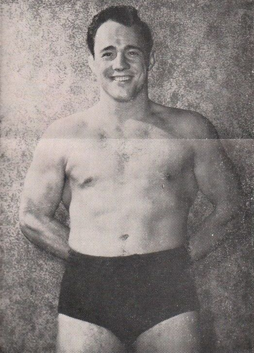 Vern Gagne en une du journal sportif Sports Facts du 28 avril 1953.